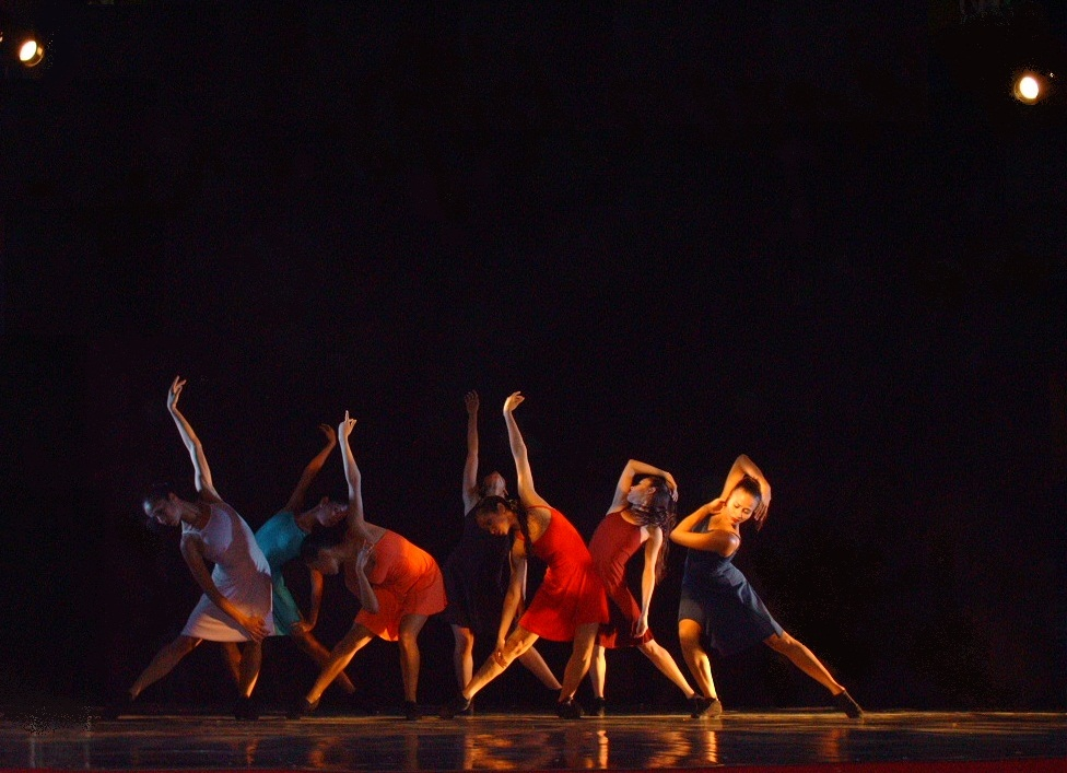 Ballet Nuevo Mundo de Caracas. "Secretos de un amor oscuro", coreografía de María Rovira. Septiembre de 2011.